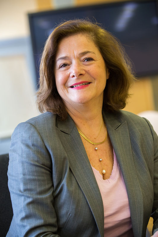 Claire Dorland-Clauzel, directrice communications Michelin, janvier 2015